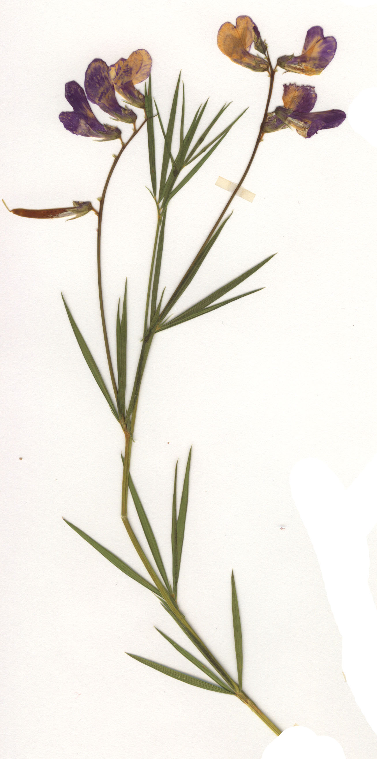 Lathyrus bauhinii, eigener Herbarbeleg vom 28. Juni 1980, Fundort: Schwäbische Alb (exakter Fundort wurde retuschiert zum Schutz des Standorts)